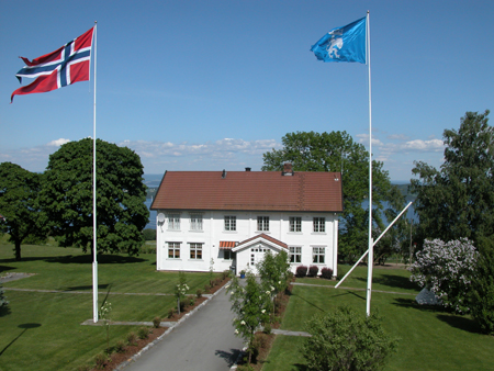 Messa på Starum med Mjøsa og Helgøya i bakgrunnen.